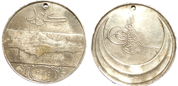 Atik Girit Madalyası: 36 mm. 24 gr. (gümüş). İhtas Tarihi: H.1285, M.1868. Madalyanın Tuğrasını Hüsrev Efendi, Yazılarını Naif Efendi, Resim ve nakışlarını Mr.Robertson yapmıştır.Kyrdelasi kırmızıdır. Bu madalya Girit Adasının hizmetinde bulunmuş olan kara ve deniz asker ve subaylarıyla, askeri komutanlara ve diğer memurlara, nışanı iftiharı olamak üzere imal edilmiştir. Giritli Rum isyancılar, 1866 tarihinde Hacı Mihail önderliğinde ayaklanarak adayı Yunanistan'a iltihak ettiklerini açıklamışlardır. Bunun üzerine Osmanlı Devleti, hem isyanı bastırarak adaya hakim olmak ve hem de Girit'e büyük devletlerin müdahelesine imkan bırakmamak için yönetsel düzenlemelere gitmiş, bu iş için Ali Paşa'yı görevlendirmiştir. 15 Şubat 1968 de yayımlanan Girit nizamnamesinde Türk'lerin ve Rum'ların yerel çoğunluğuna dayalı yönetimmeclisleri ile bu meclislerin çalışmalarıyla ilgili kanun ve yönetmelikler hazırlanmıştır. İşte bu madalya Girit isyanında görev yapan askerler ve yukarıda belirtilenlere verilmiştir.